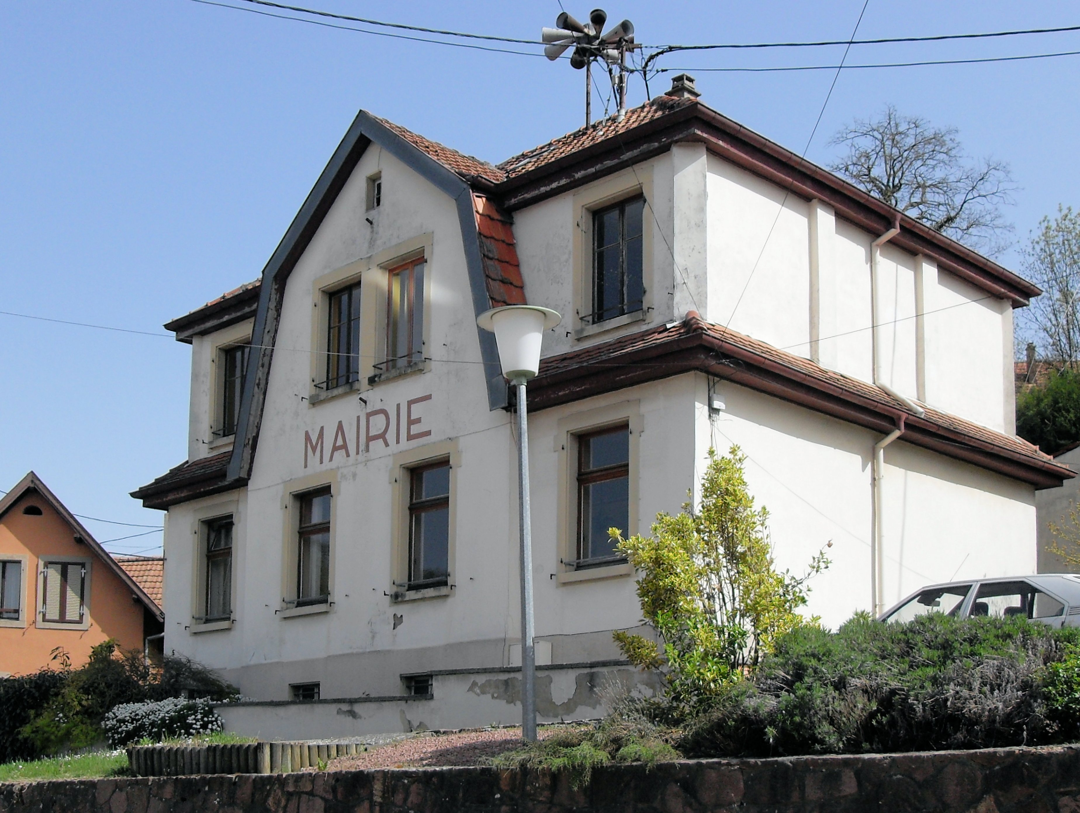 La mairie de Flaxlanden